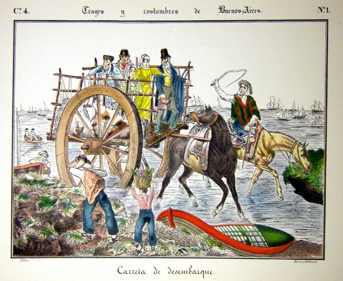 Carreta desembarcando pasajeros